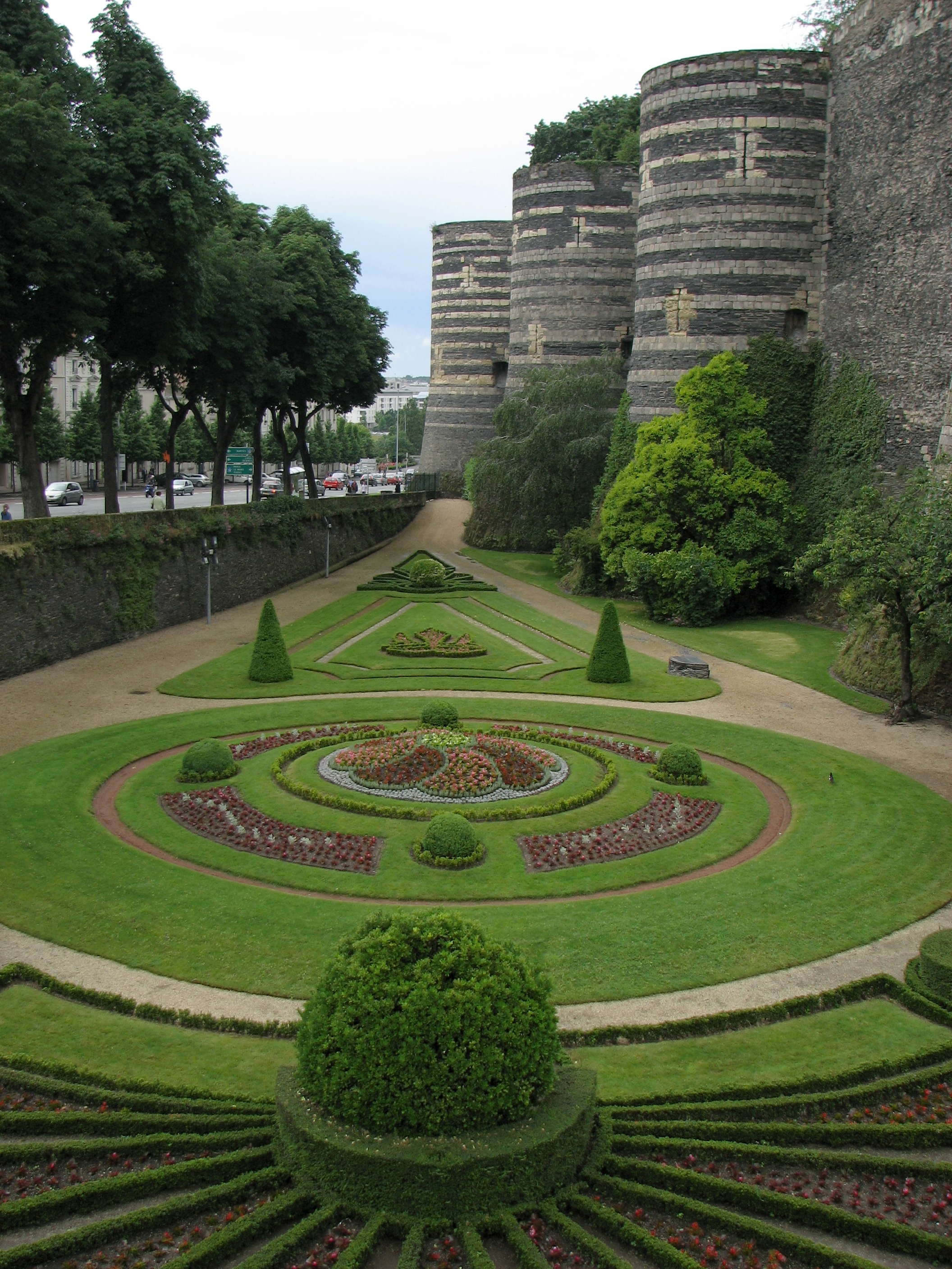 Jardin dans les douves du château d'Angers. La tour la plus au fond est la porte des champs.